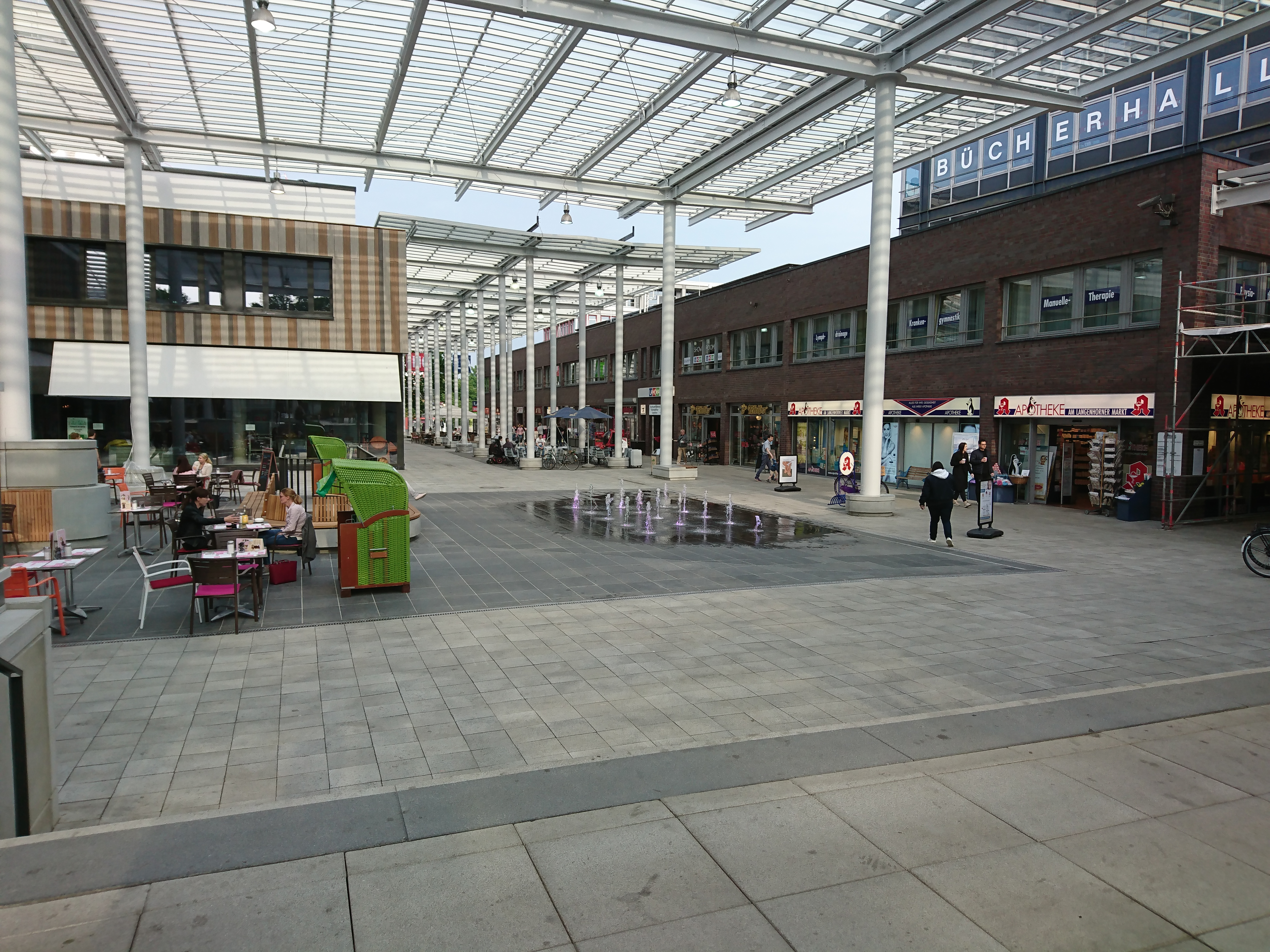 Teilansicht Einkaufzentrum Langenhorner Markt LaHoMa Living Plaza, Hamburg-Langenhorn, mit einem Springbrunnen, dessen Fontänen von unten mit wechselfarbigen Licht beleuchtet werden